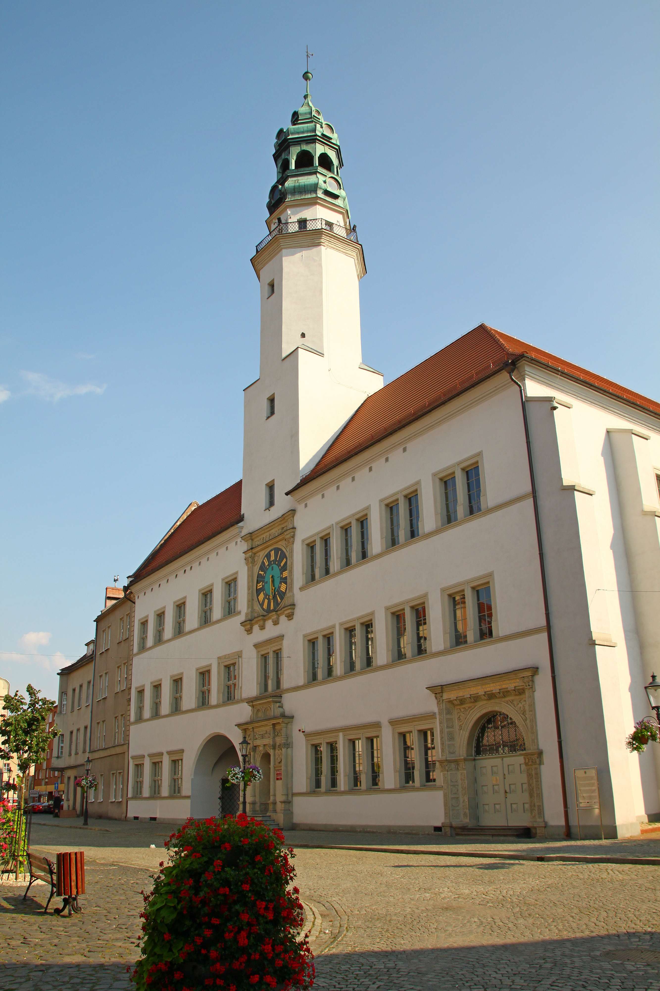 Lubań, ratusz, XV, XVI